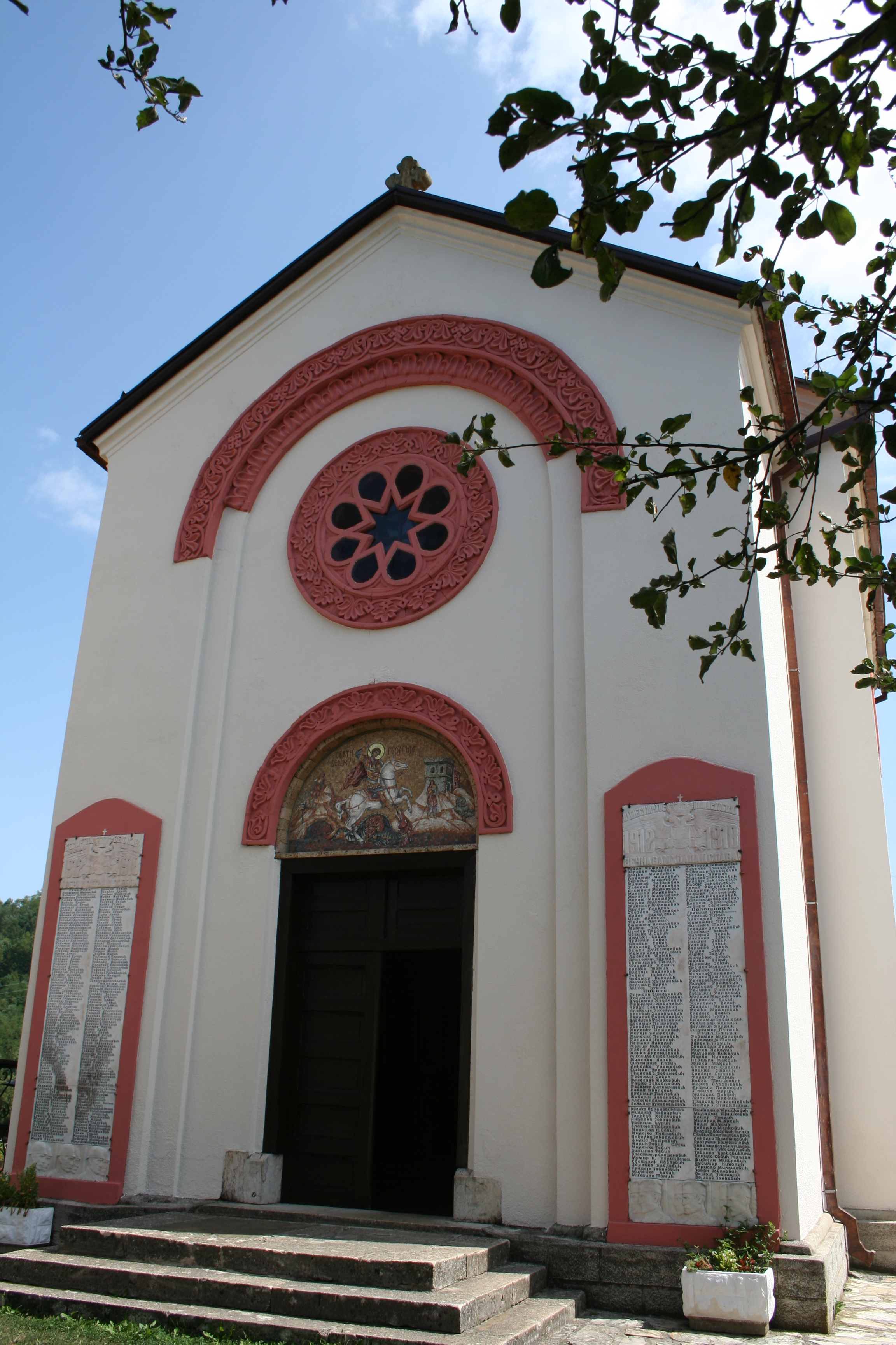 Crkva brvnara Seča Reka